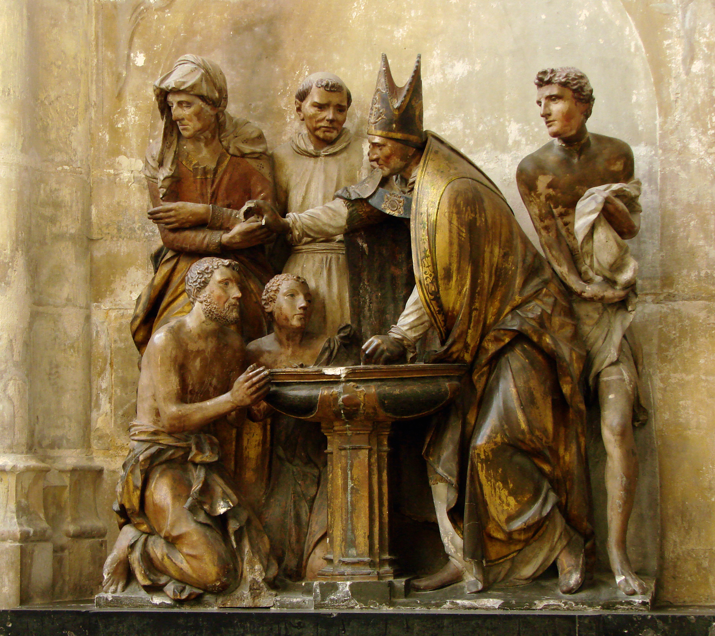 Groupe en pierre datant de 1549 et représentant le baptême de Saint Augustin. Cathédrale Saint-Pierre-et-Saint-Paul de Troyes.